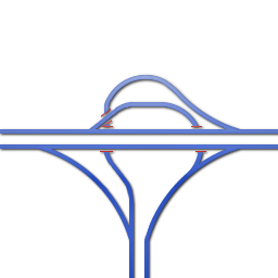 Een schema van een half turbineknooppunt, gemaakt door mezelf.